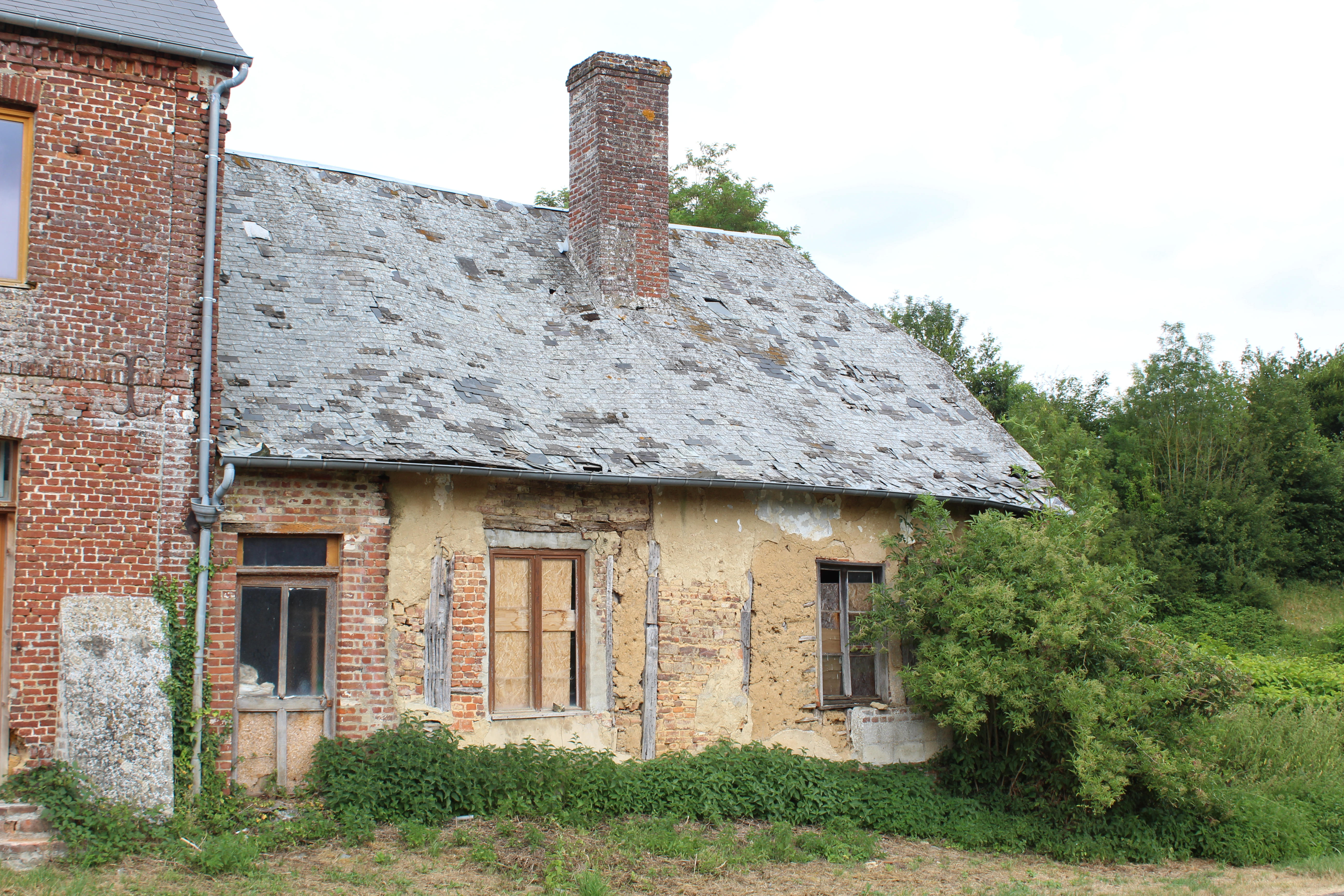 Vieille maison en torchis